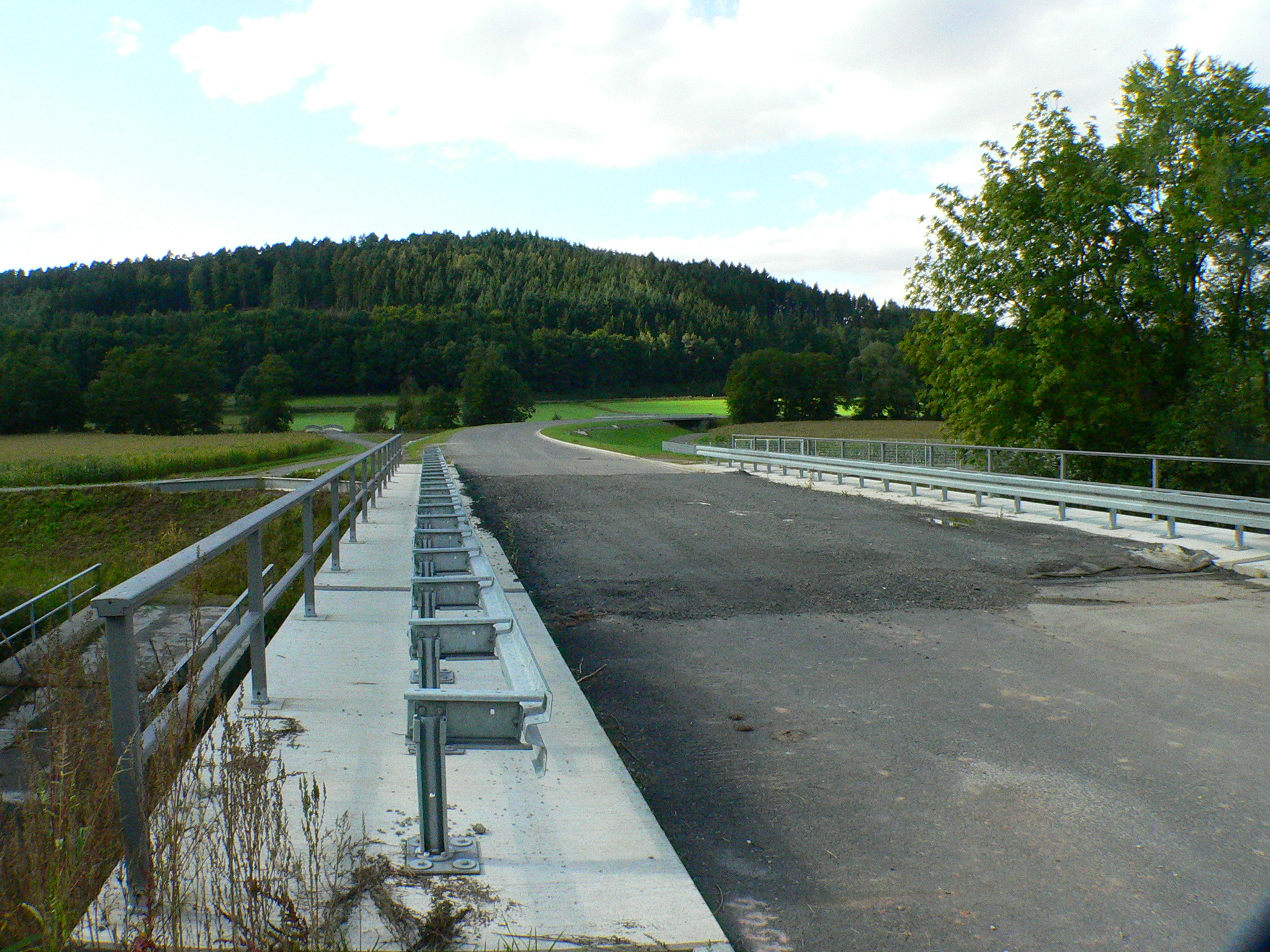 Bundesstraße 45, Umgehung von Höchst im Odenwald, Deutschland, Bauzustand September 2008